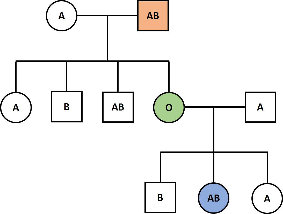 שושלת המדגימה סוג דם בומביי בבני אדם